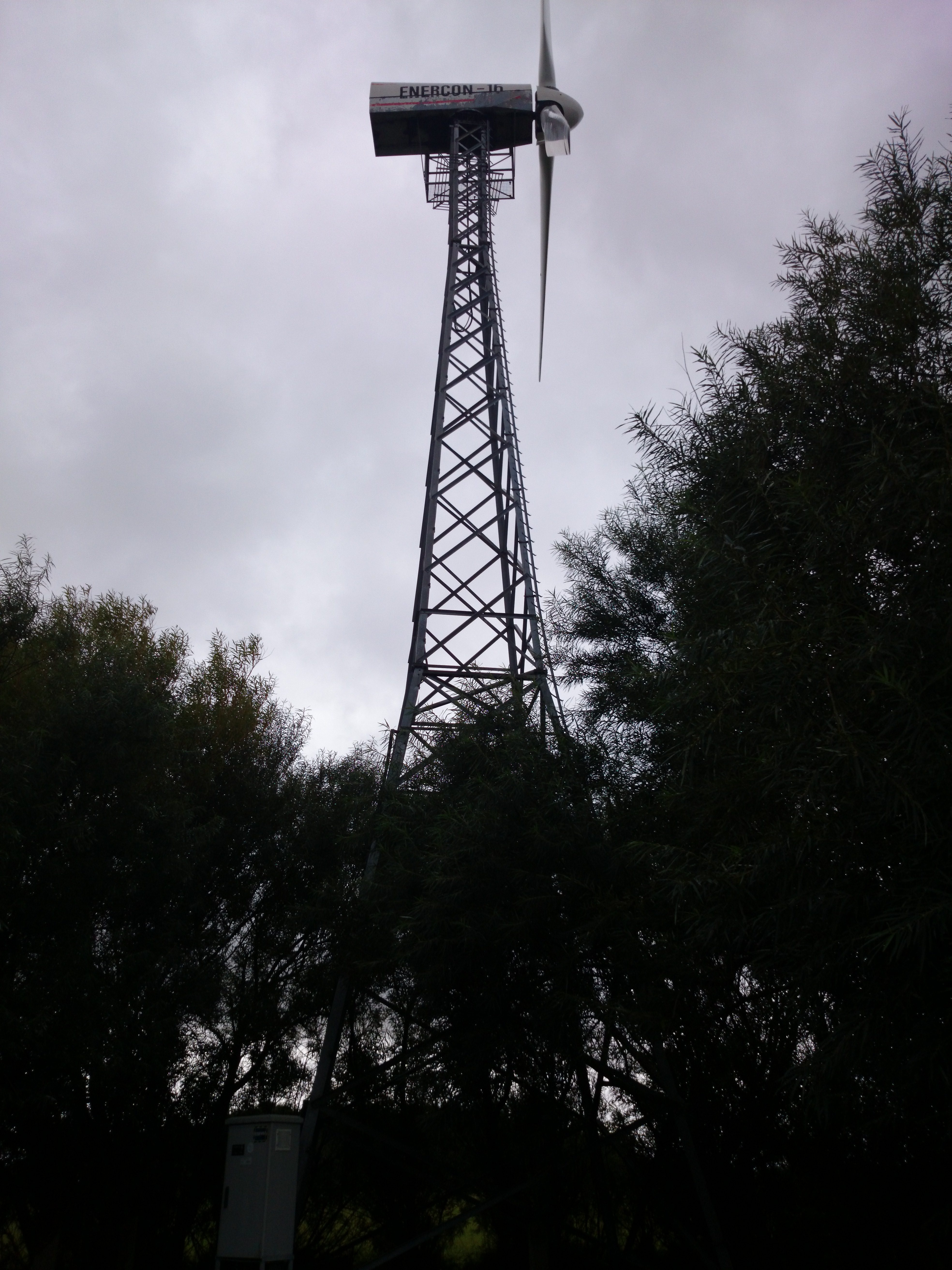 ENERCON 16 im Windpark Fledderweg, 26506 Norden. Masthöhe 22 m, Rotordurchmesser 16,16 m, Leistung 55 kW, Baujahr 1987